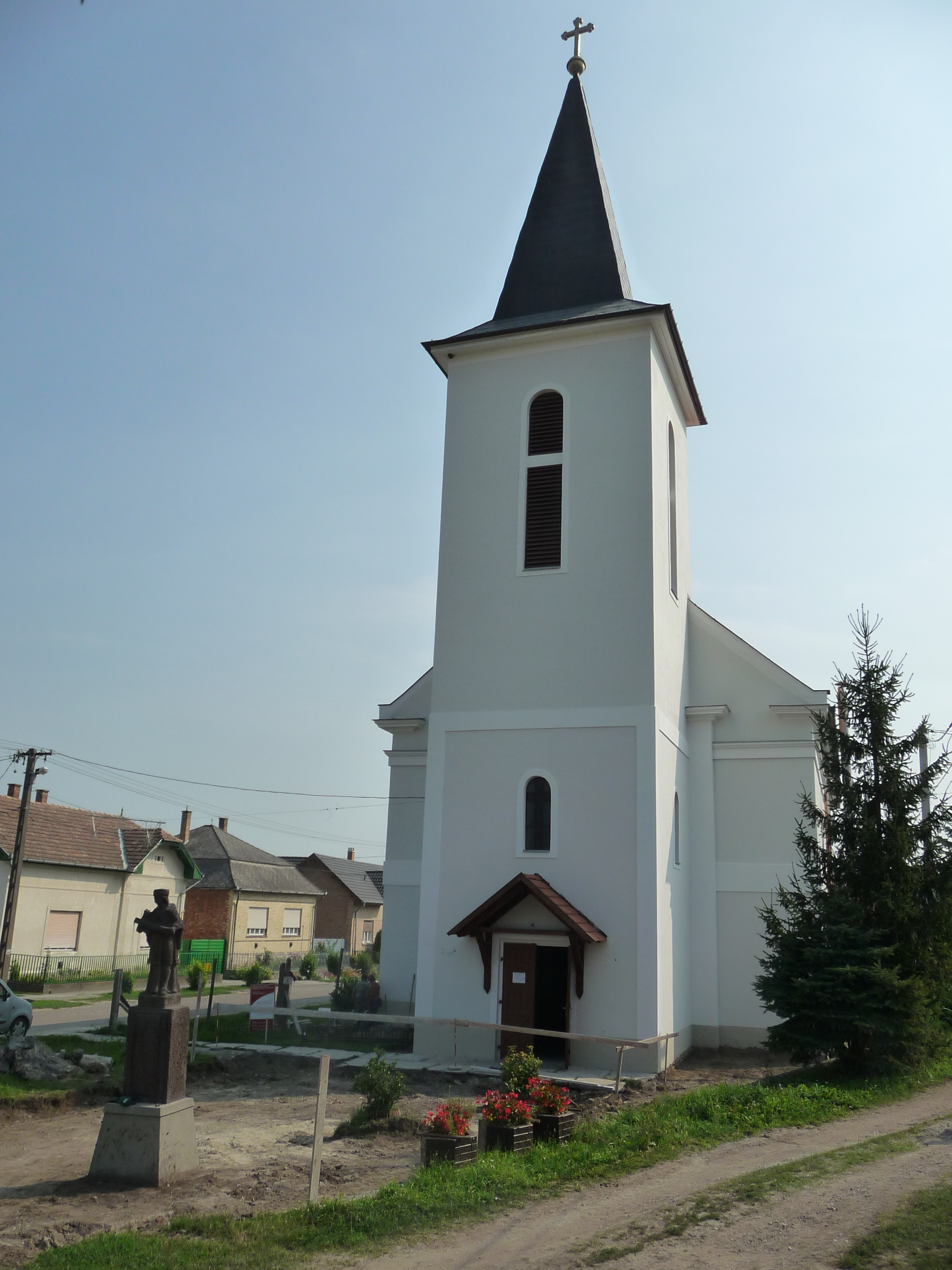 Kisboldogasszony temploma Héhalomban